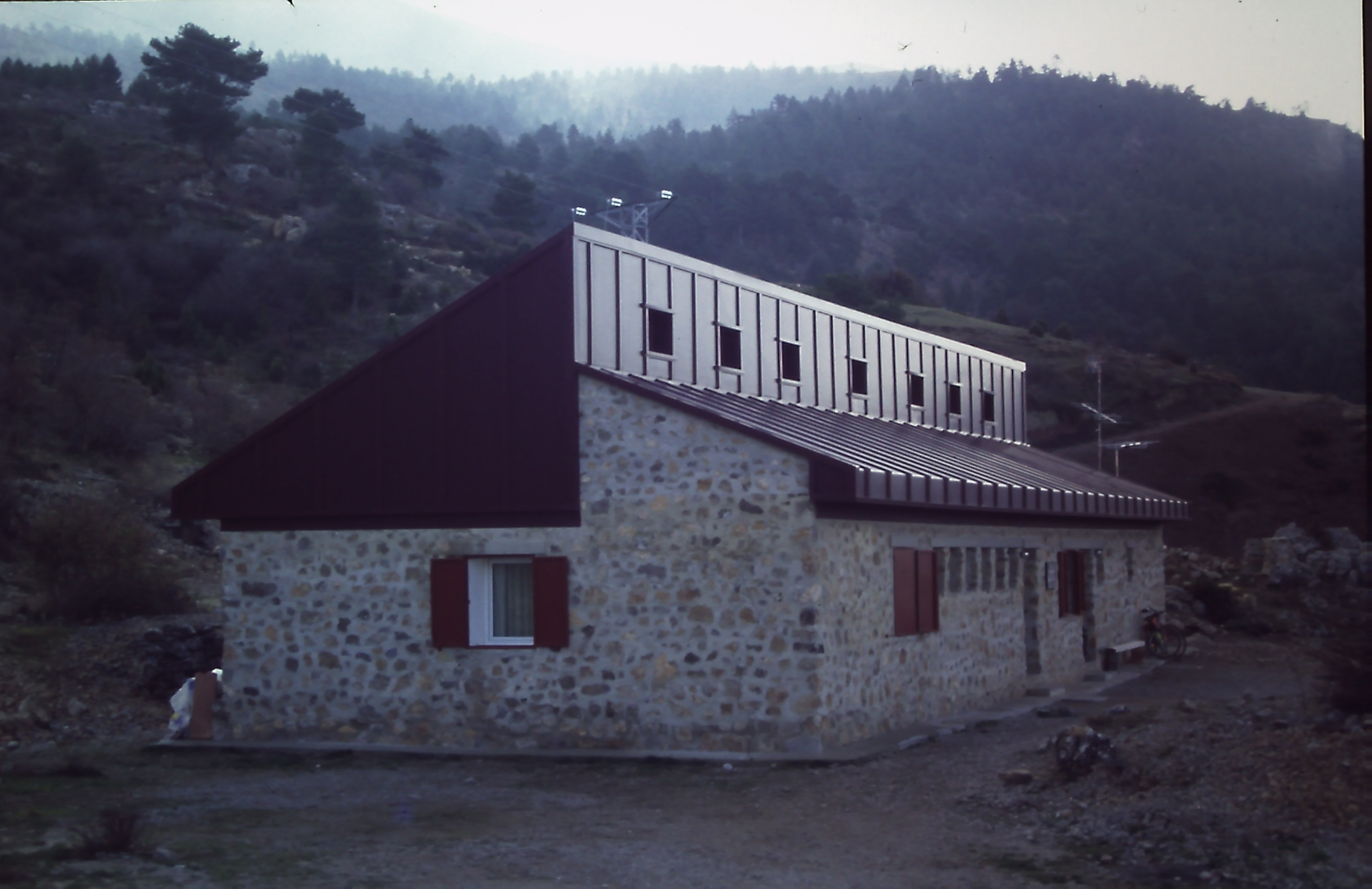 Refugi Rabadà i Navarro a Camarena de la Sierra (escanejada de diapositiva)